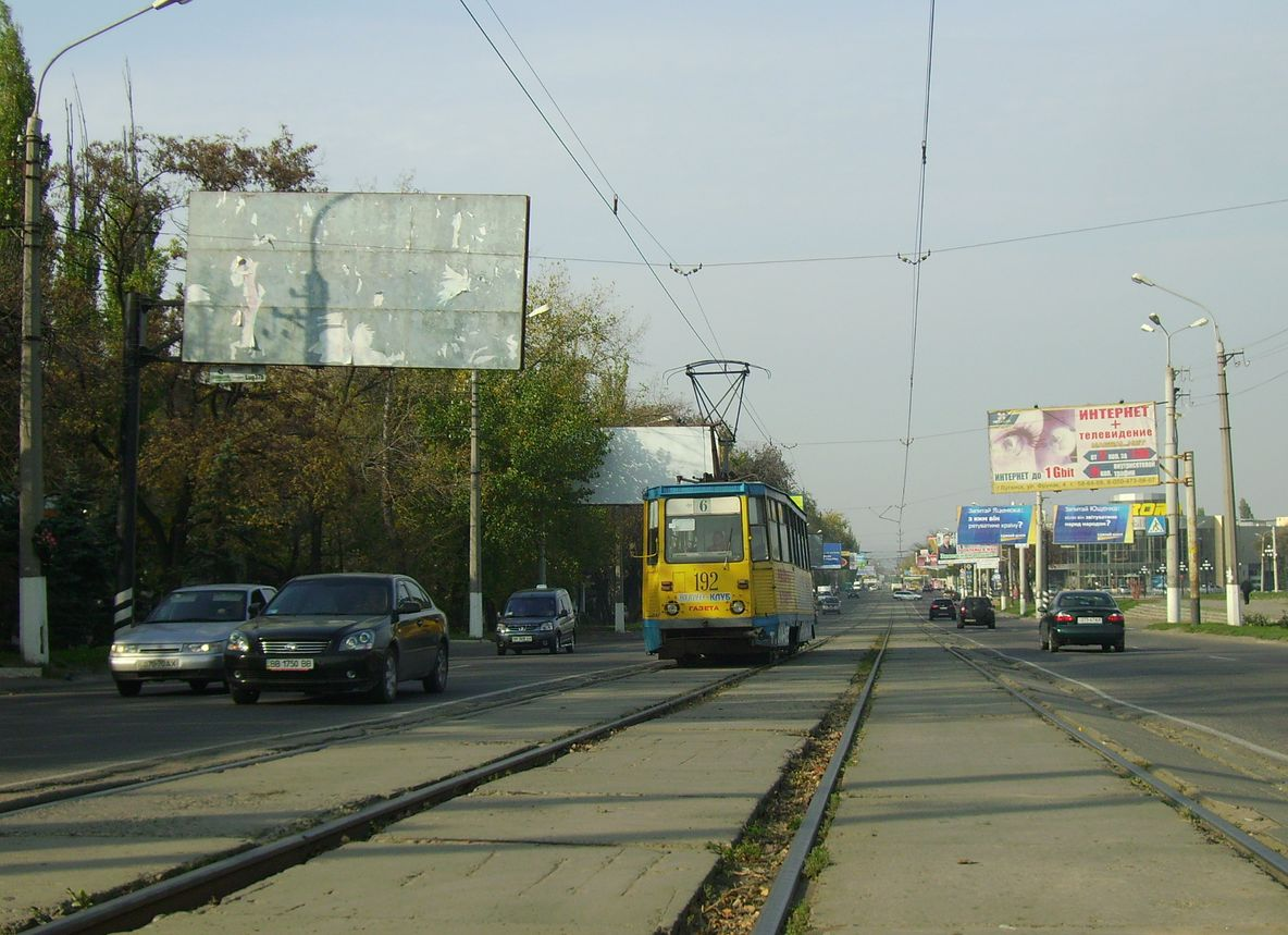 Трамвай едет по улице Луганска